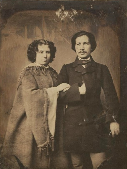 Władysław Bakałowicz z żoną Wiktoryną z Szymanowskich